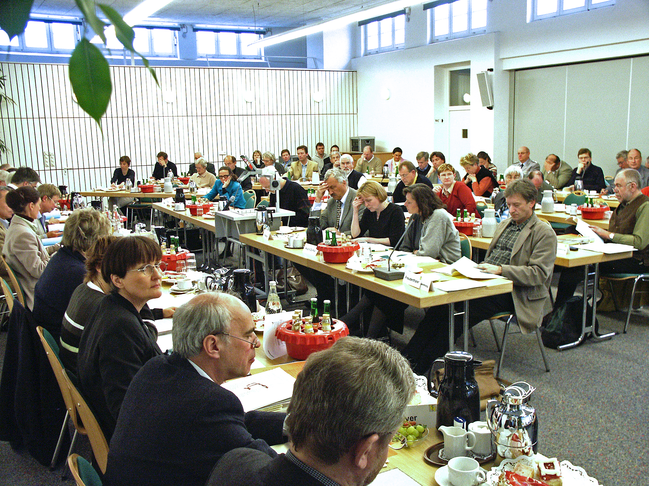 Kammerversammlung der Ärztekammer Schleswig-Holstein; links vorn Vorstand und Geschäftsführung, rechts Mitglieder der Kammerversammlung